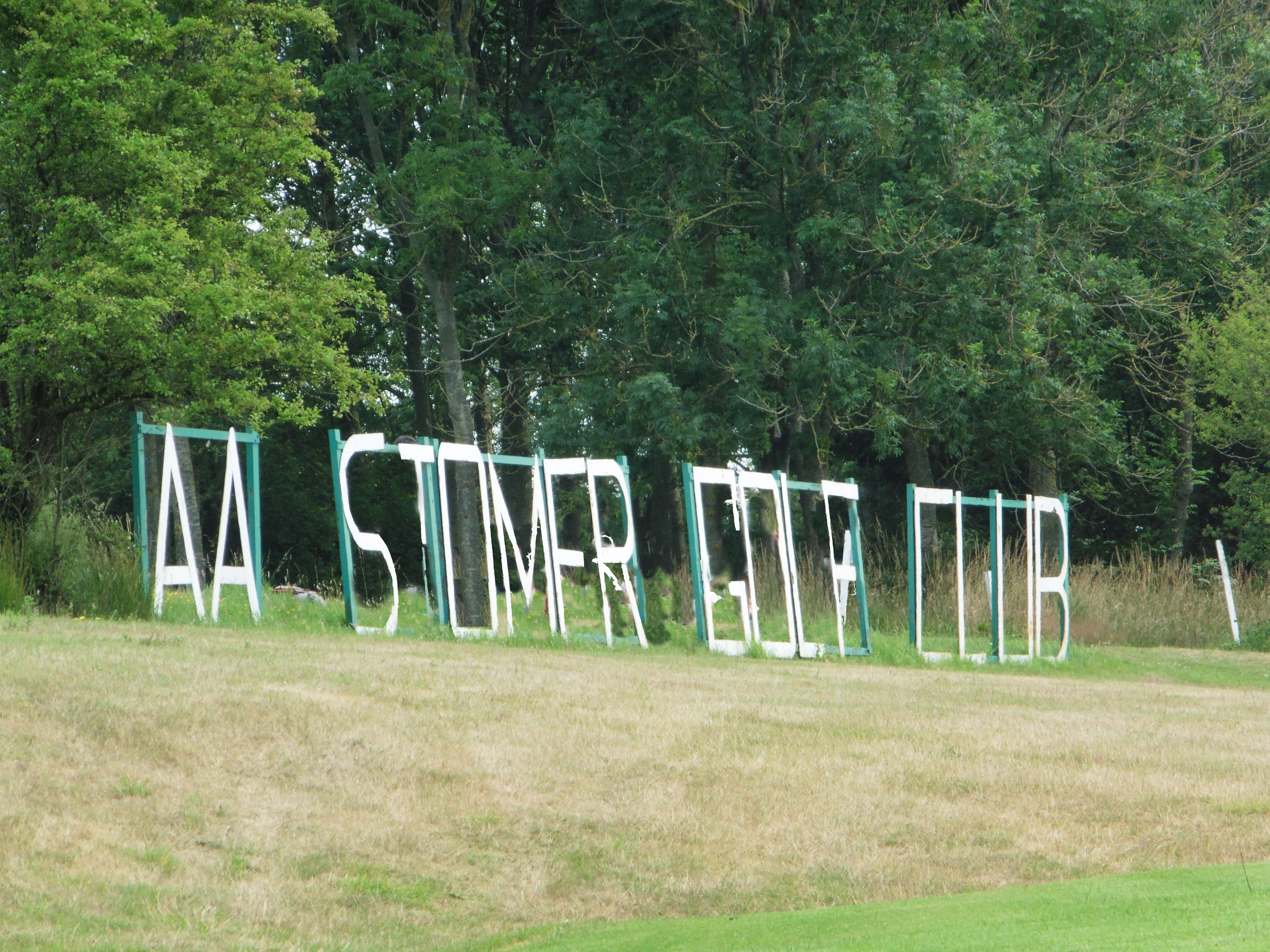 Aa Golf de Saint-Omer Club 'Acquin , dans l' Audomarois.- Pas-de-Calais